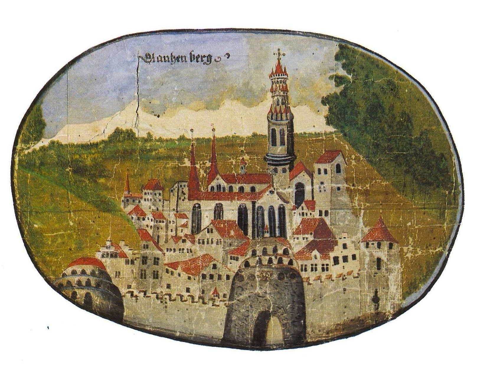 Burgstädtchen Glanzenberg auf dem Plan von 1727 im Kloster Fahr von Jacob Schäppi